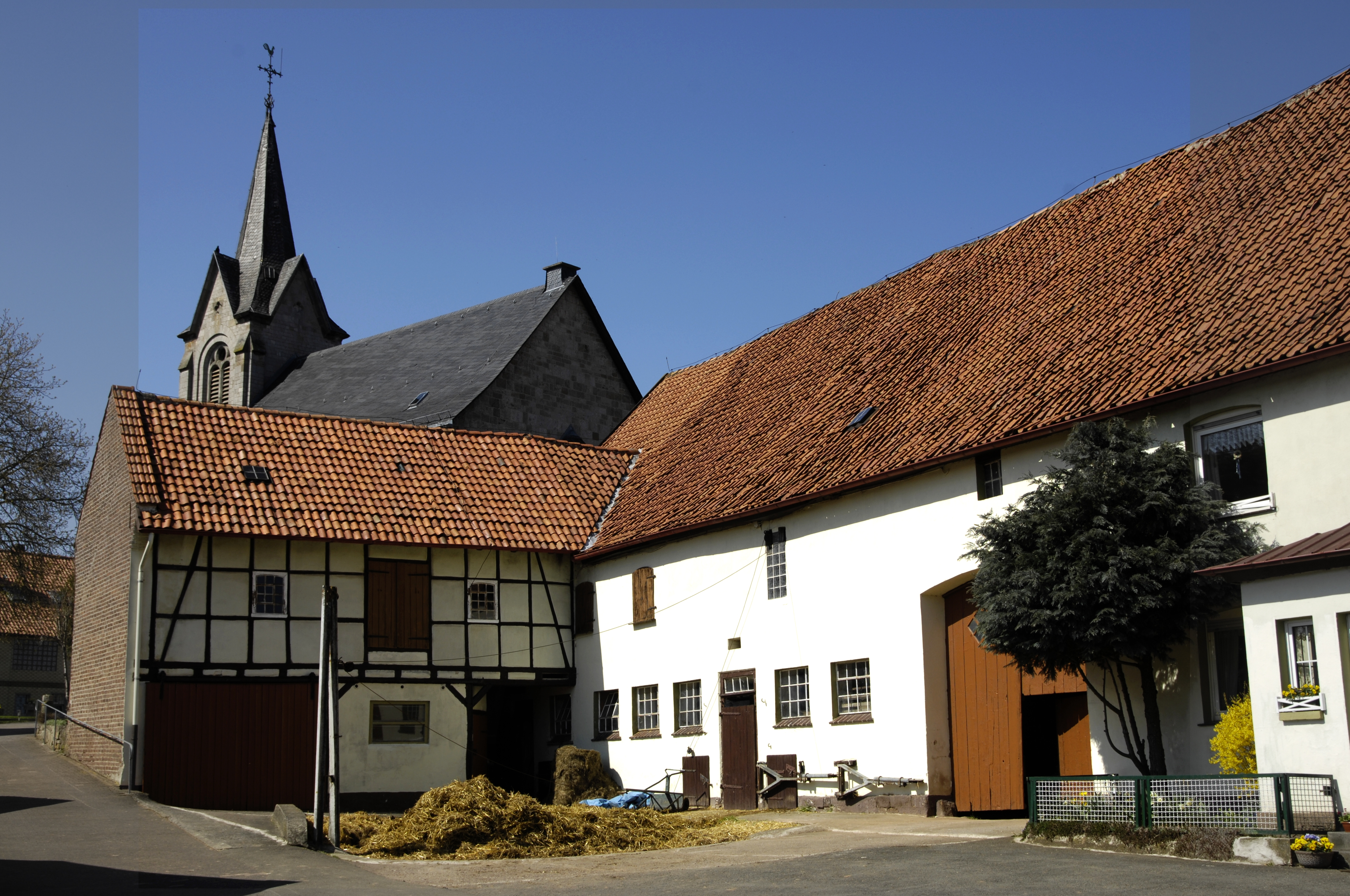 Vasbeck, Dorfidylle